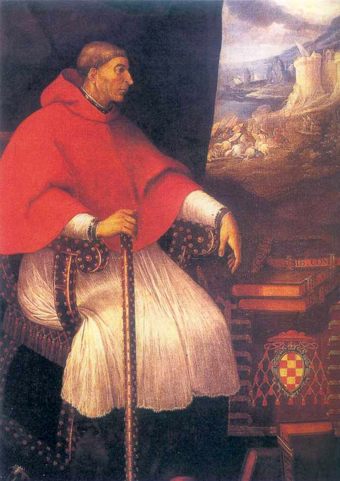 Francisco Jiménez de Cisneros (1436 - 1517). Cardenal Cisneros, clérigo y político español.